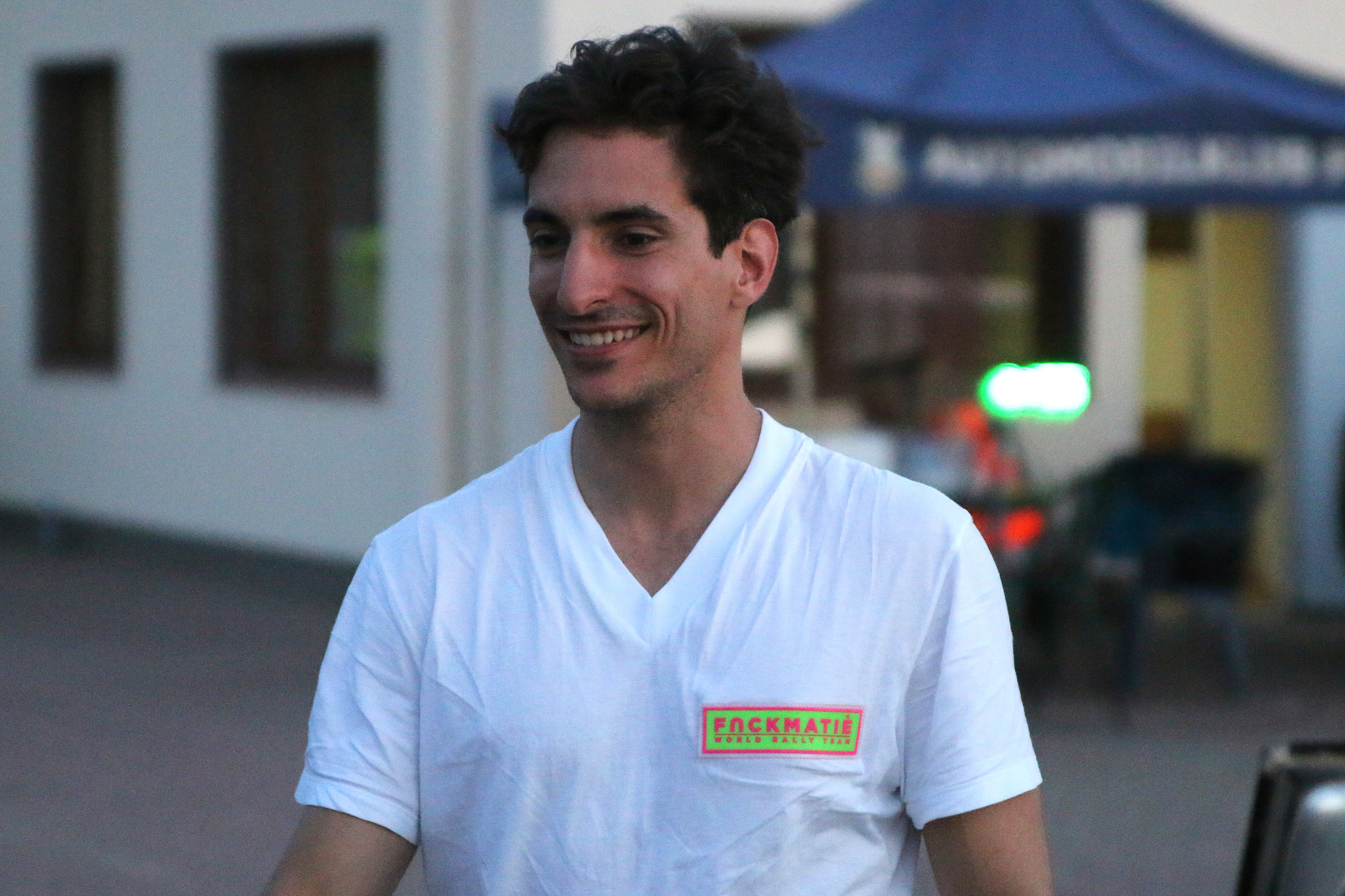 Lorenzo Bertelli